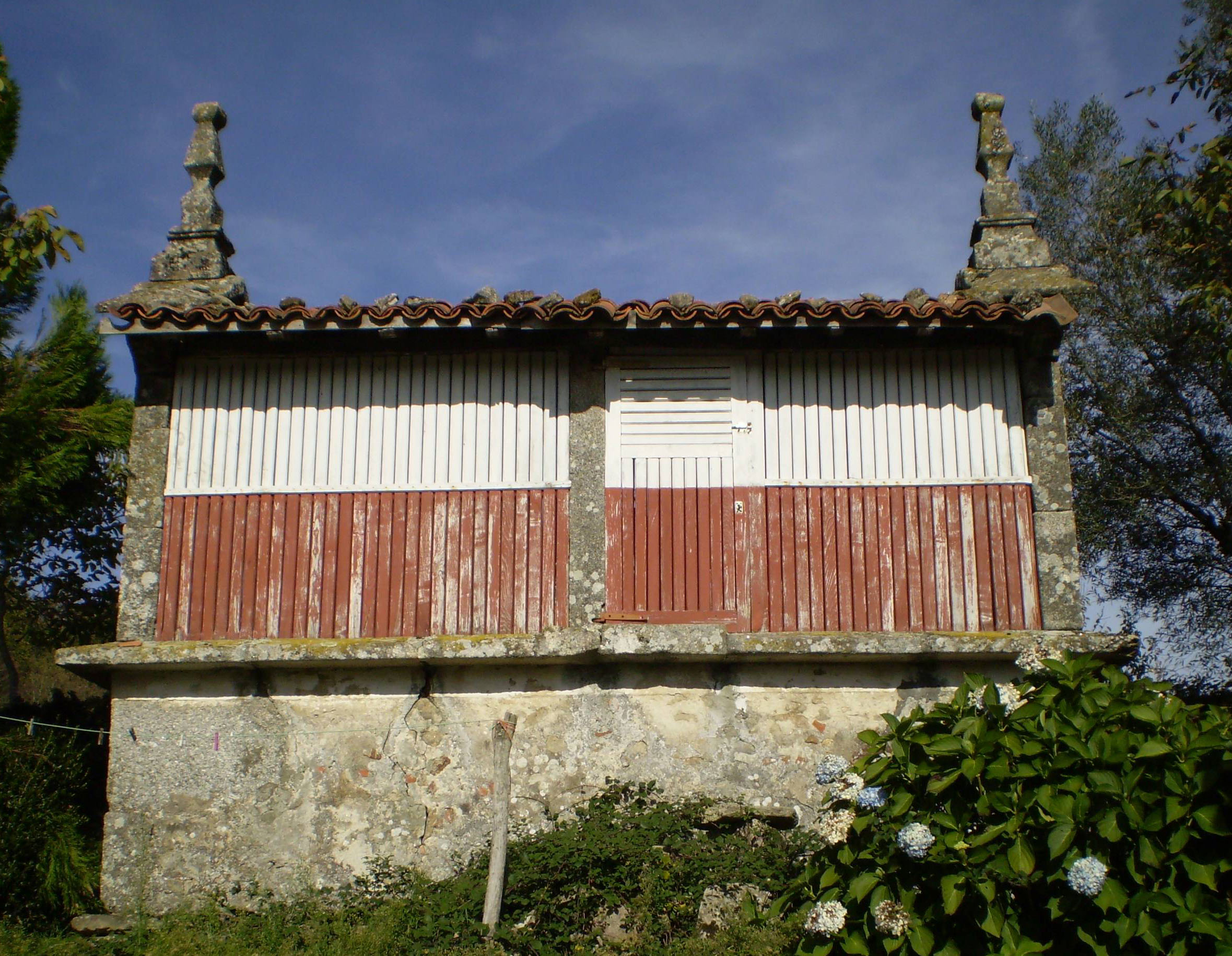 Hórreo tipo mahía, de dous claros, adornado con dous lampións e elevado sobre soleira ad hoc. Ubicado no lugar de Caldelas (Antas de Ulla)